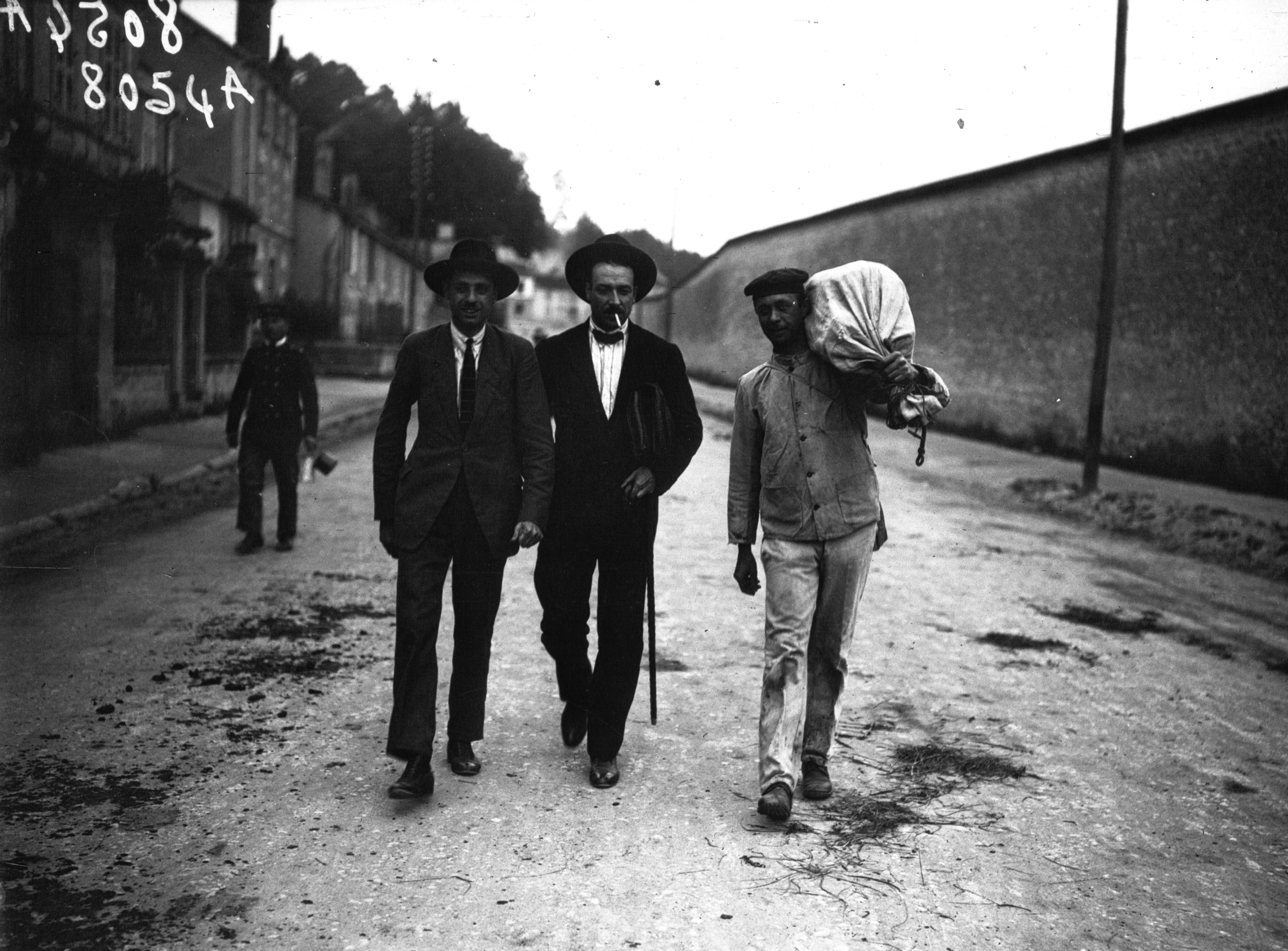 Clairvaux : Marty à sa sortie de prison, avec son frère : photographie de presse